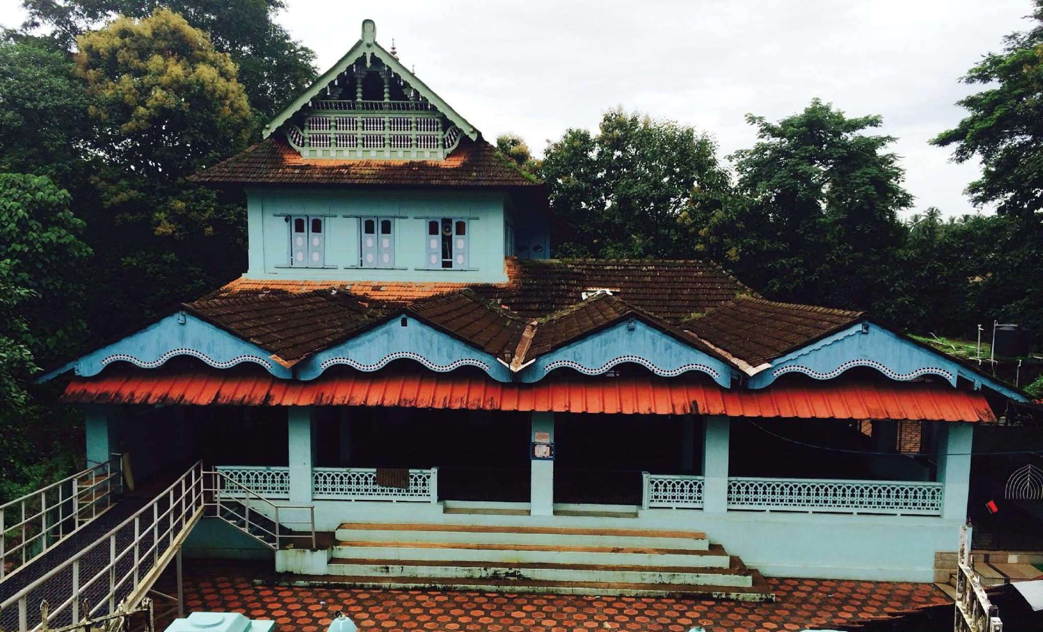 ഇരിക്കൂര്‍ ജുമാ മസ്ജിദ്